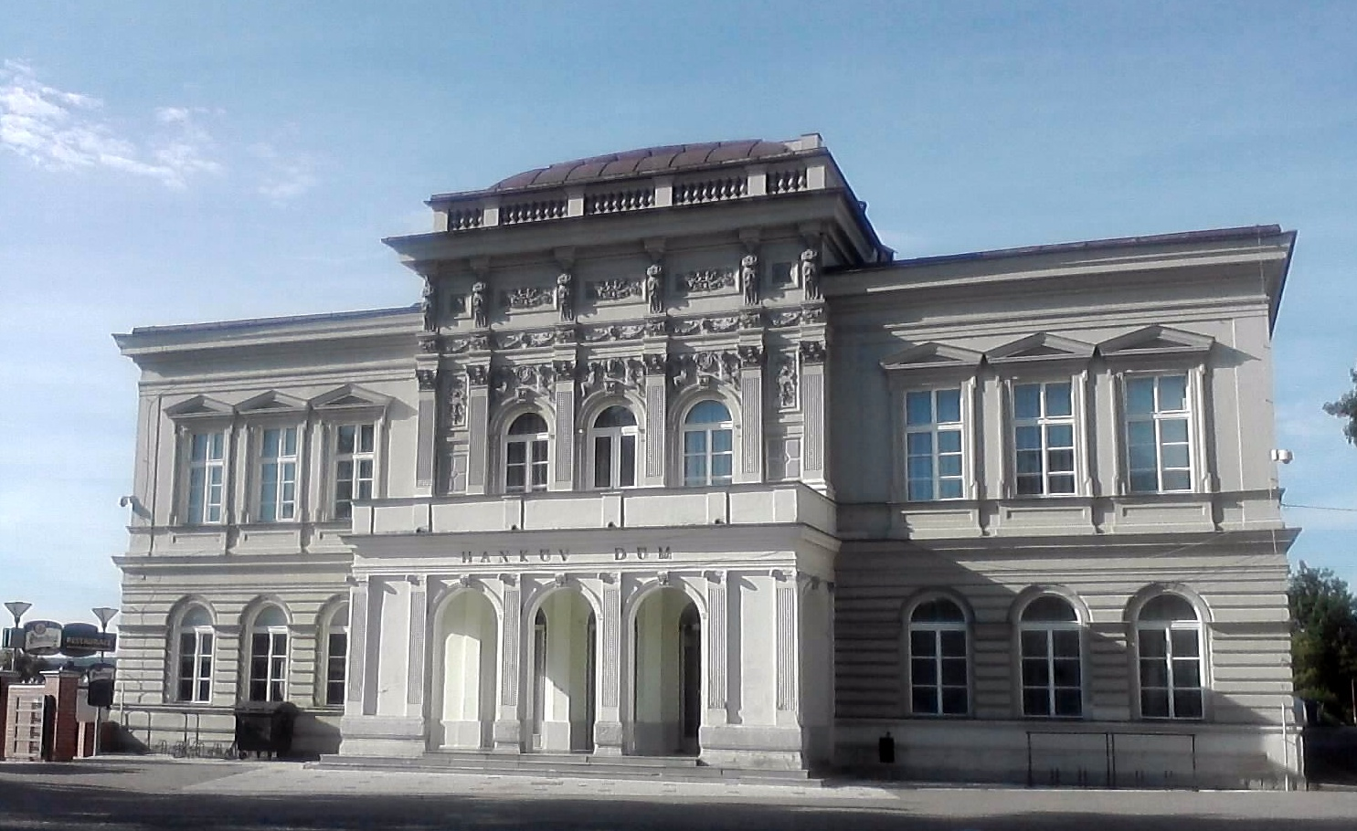 Dvůr Králové nad Labem, Společenský dům - Hankův dům.